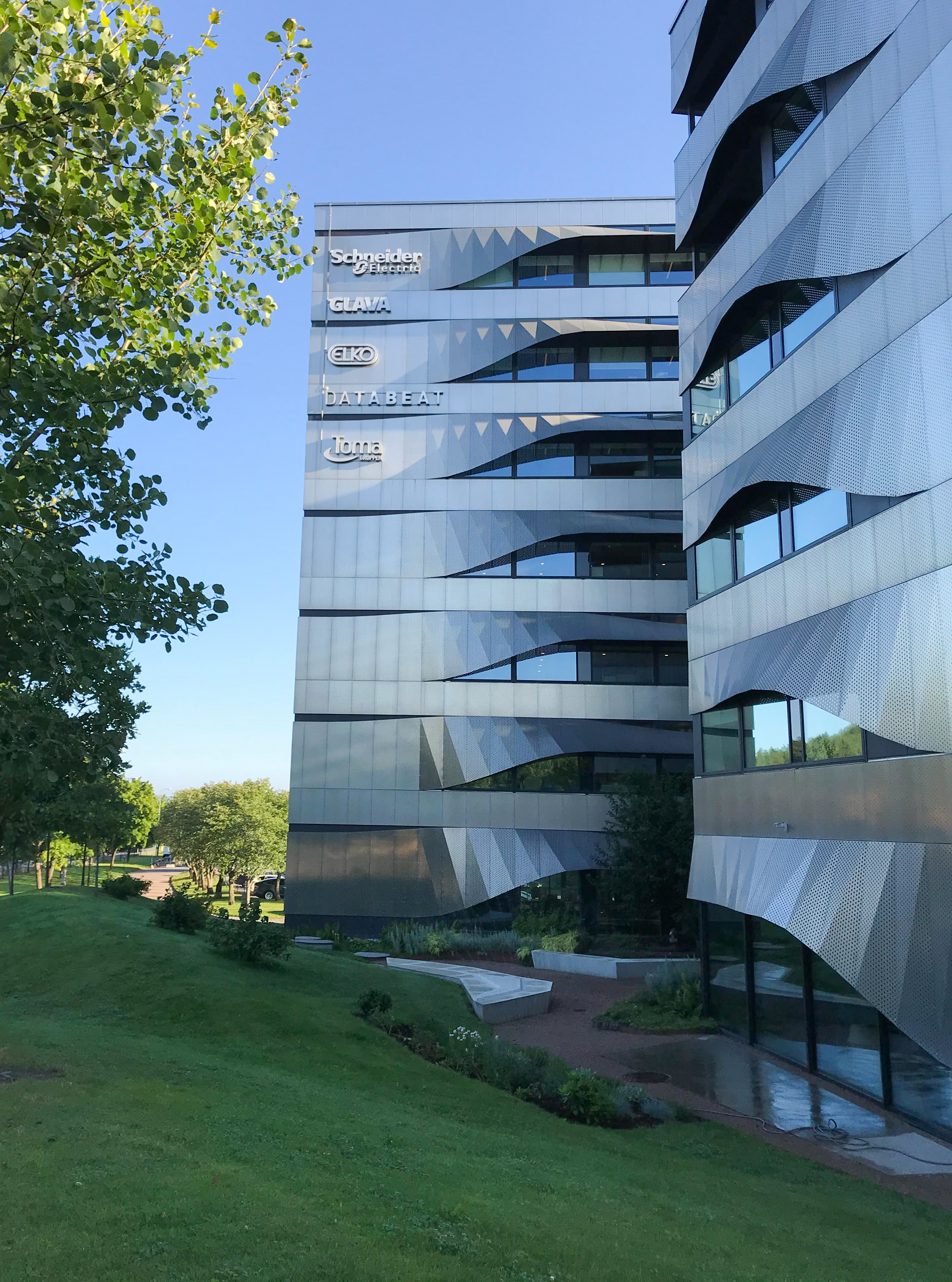 ELKO sitt hovedkontor på Ryen i Oslo.